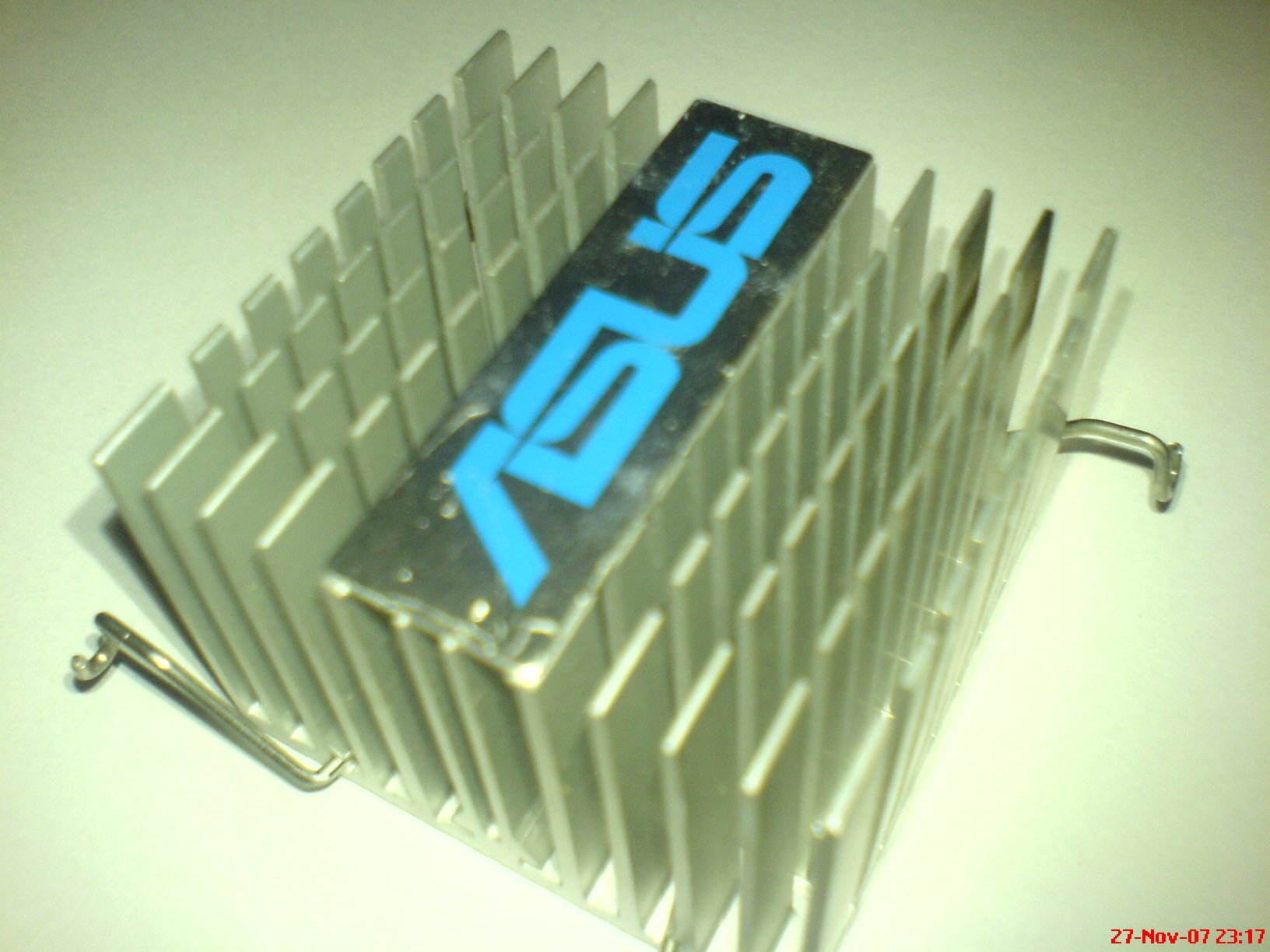 ASUS heatsink